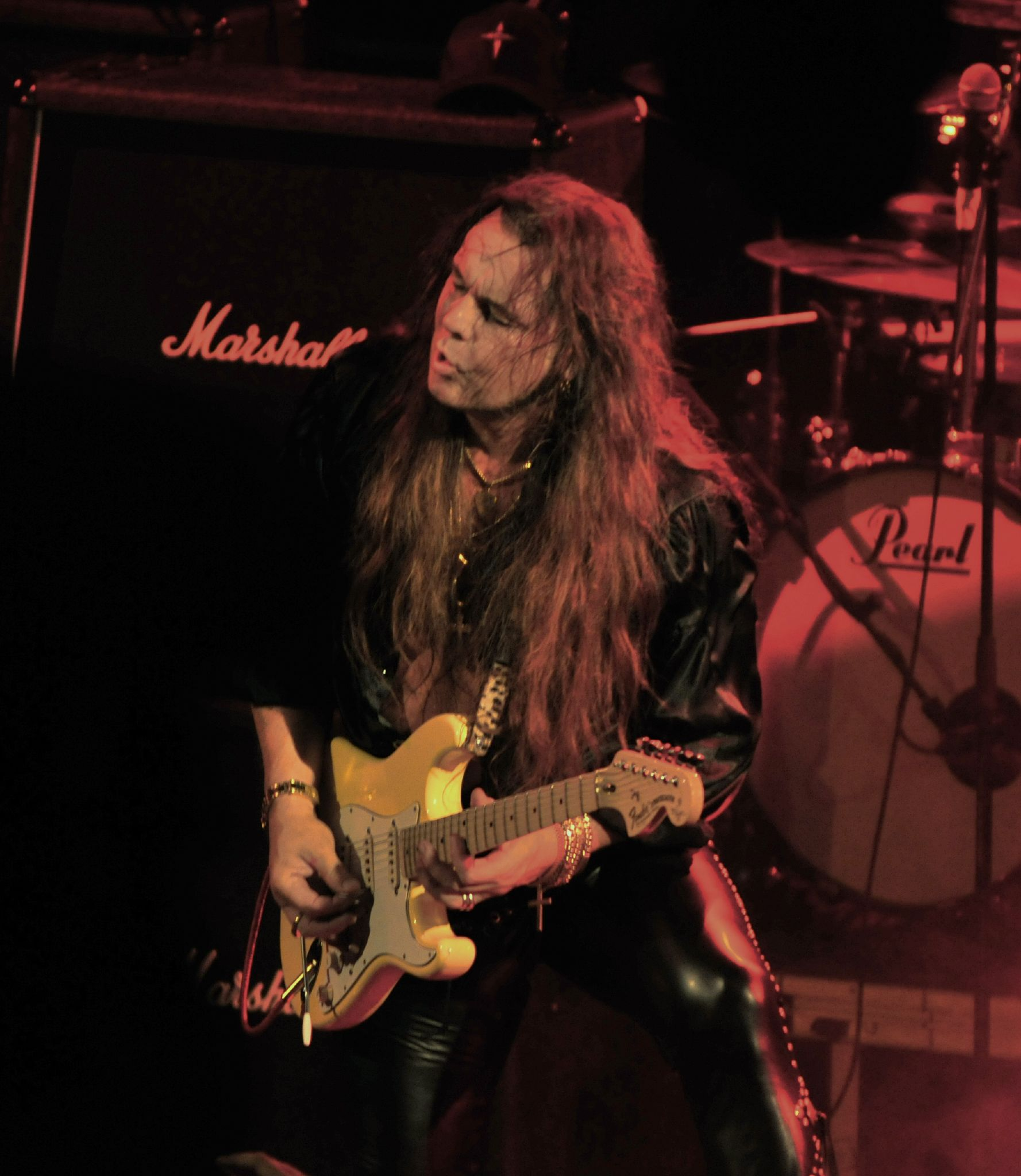 Concierto de Yngwie Malmsteen en la sala Apolo de Barcelona